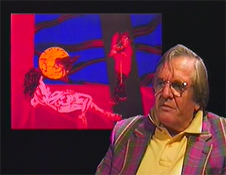 Portrait de Antonio Recalcati